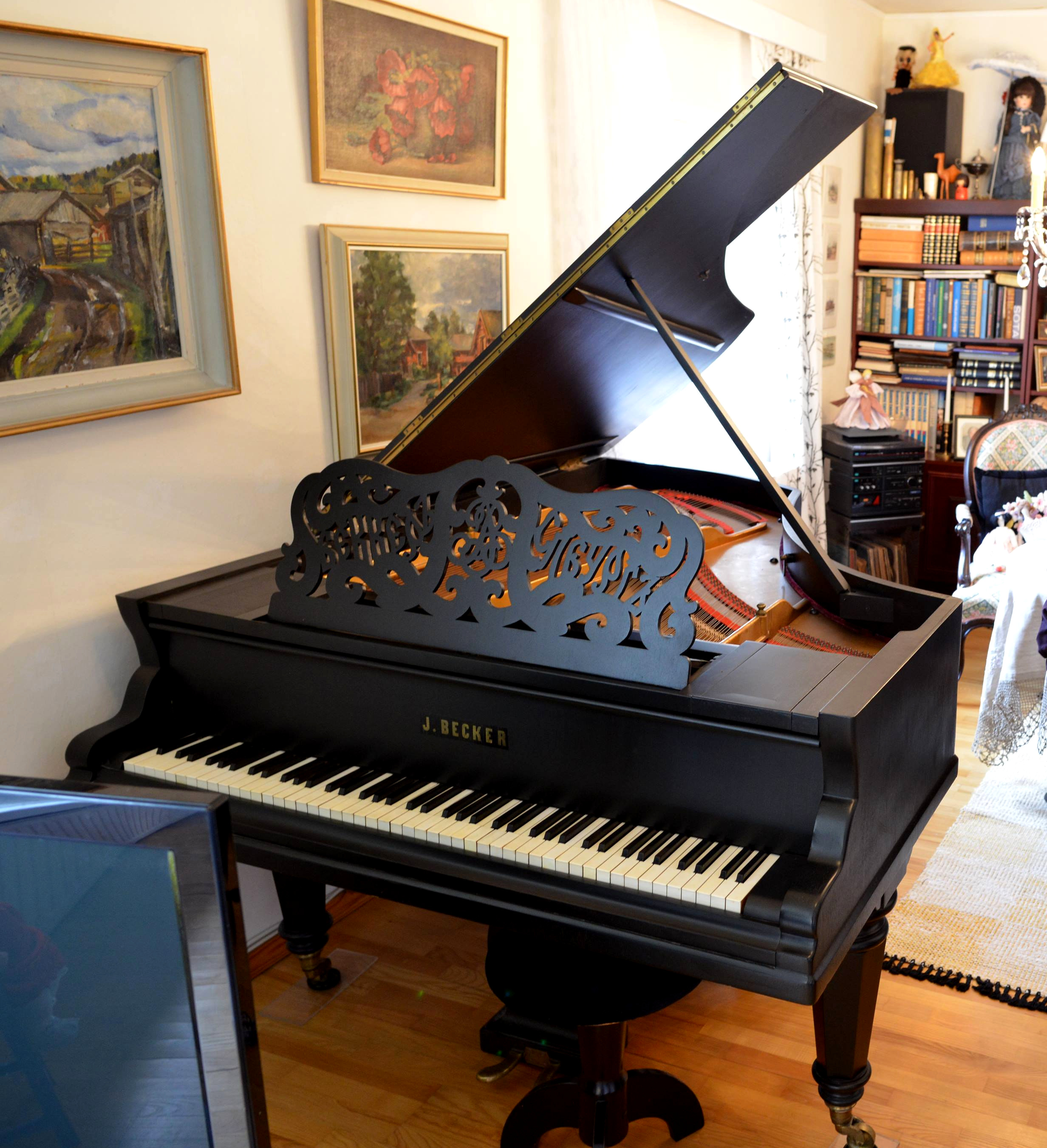 Becker-flyygeli 1800-luvulta